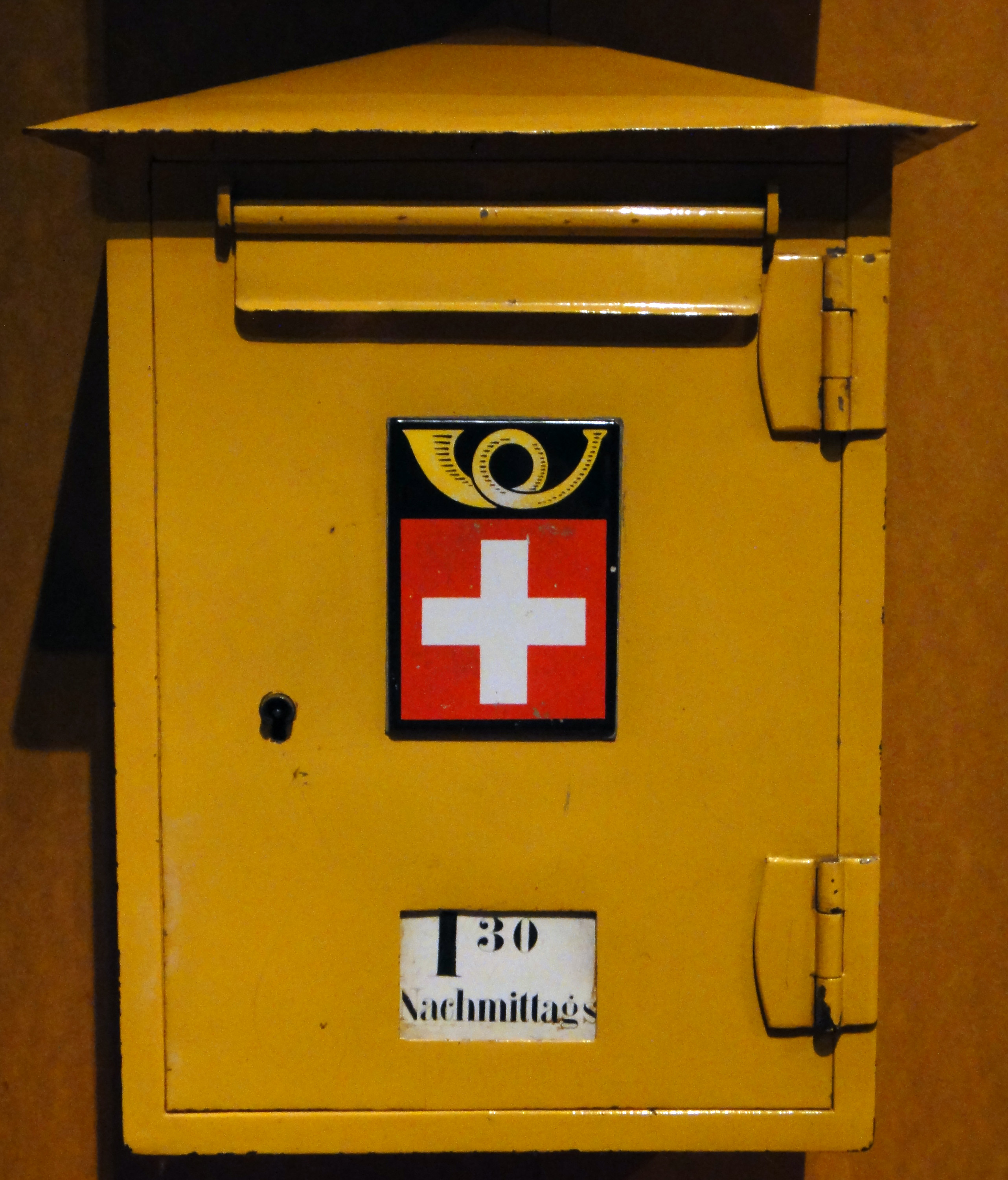 Postbriefkasten der Schweizerischen Post, Typ 1920, mit Signet 1930-1938. Museum für Kommunikation Bern.